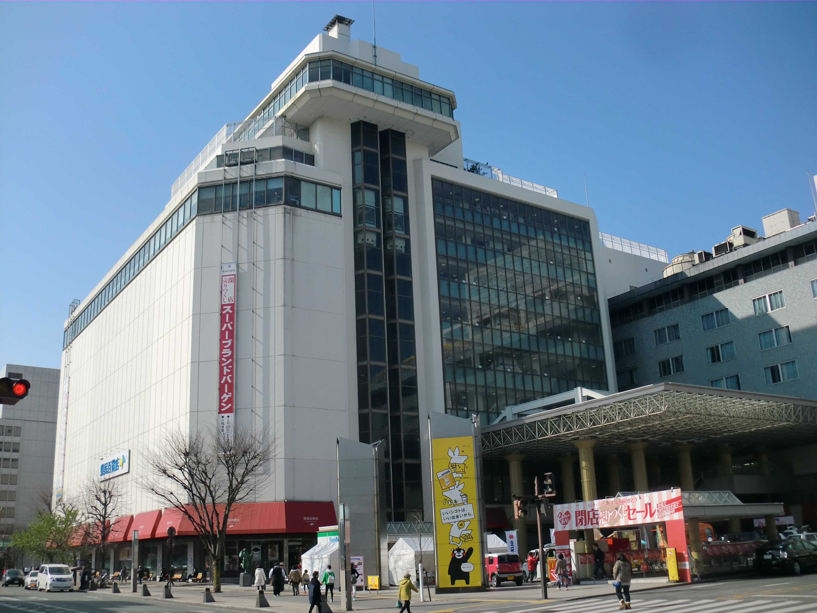 熊本市中央区にある県民百貨店（最終日）